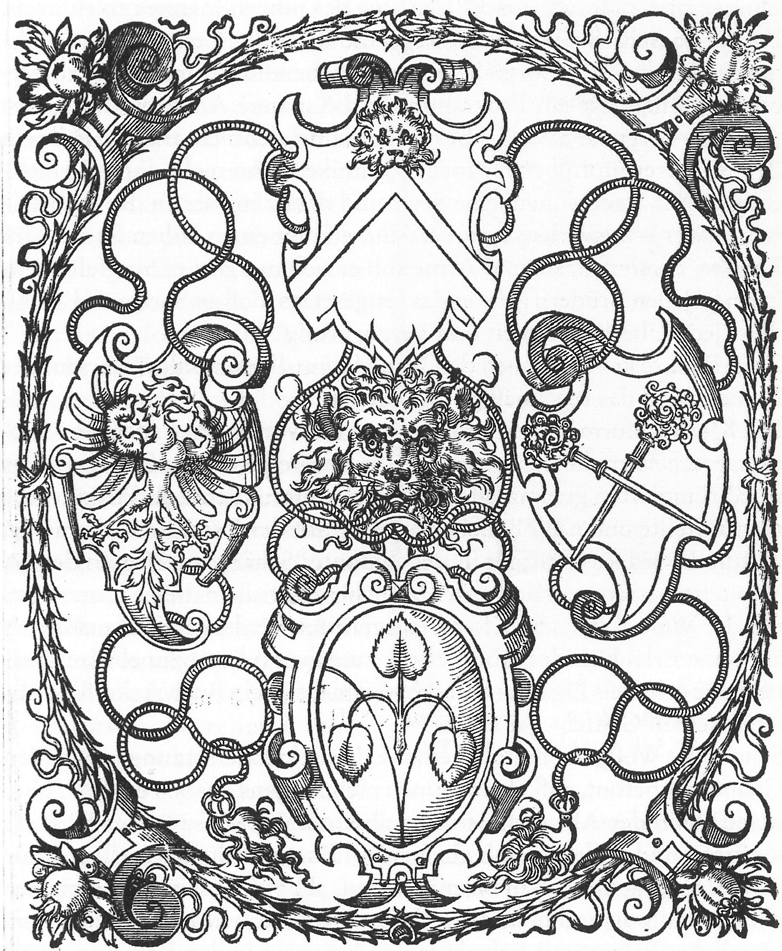 Wappen des Münsterschwarzacher Abtes Johannes IV. Burckhardt